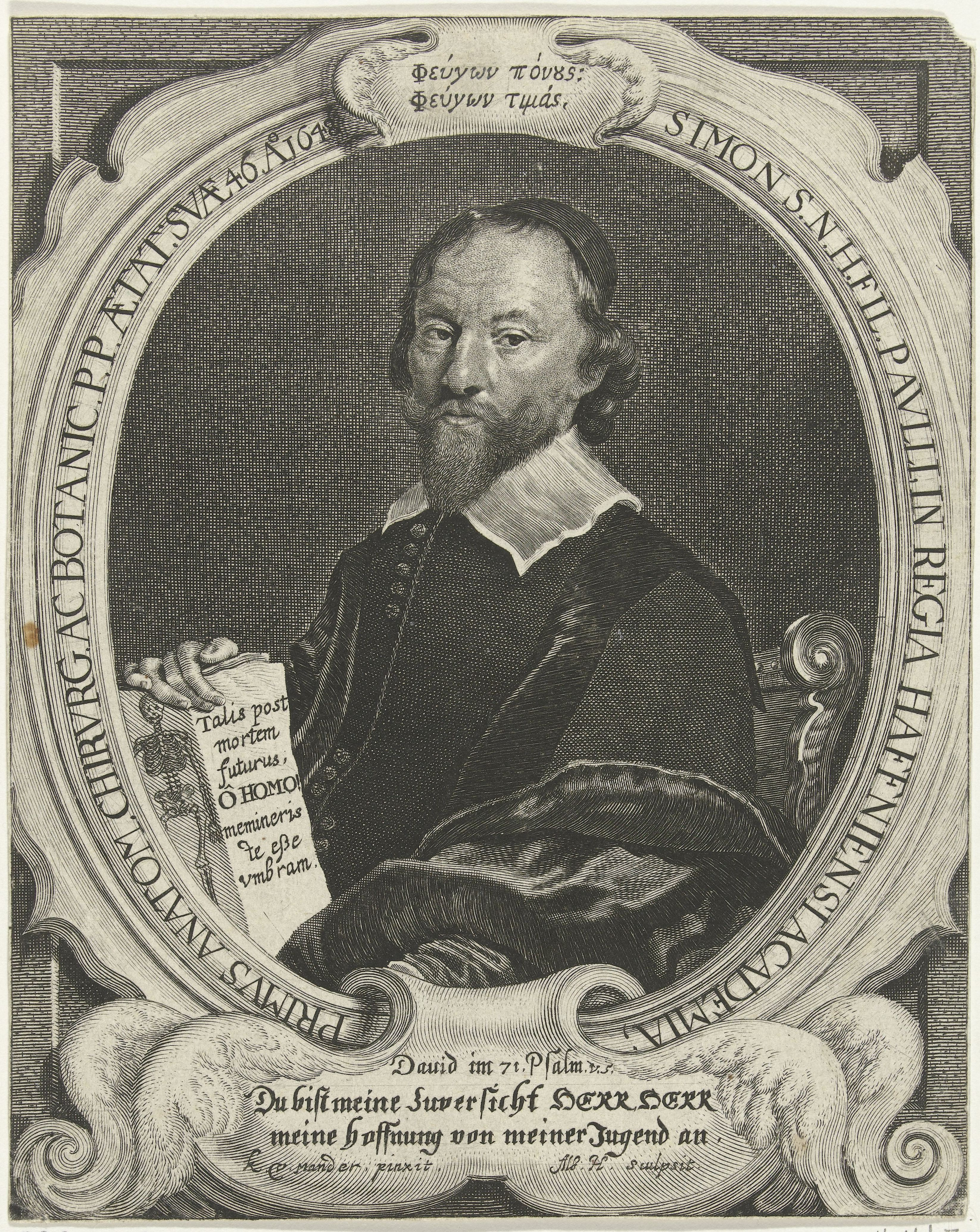 IdentificatieTitel(s): Portret van Simon PaulliObjecttype: prent Objectnummer: RP-P-1878-A-961Catalogusreferentie: Hollstein Dutch 79Opschriften / Merken: verzamelaarsmerk, verso midden onder, gestempeld: Lugt 2228Omschrijving: Portret ten halven lijve naar links van Simon Paulli, professor te Kopenhagen, in een ovaal, een boek over anatomie in de hand houdend. Onder zijn portret een cartouche Waar: in de tekst David im 71. Psalm en de verzen in het Duits. Boven zijn portret twee regels in het Grieks.VervaardigingVervaardiger: prentmaker: Albert Haelwegh (vermeld op object)naar schilderij van: Karel van Mander (vermeld op object)Plaats vervaardiging: KopenhagenDatering: 1648Fysieke kenmerken: gravureMateriaal: papier Techniek: graveren (drukprocedé)Afmetingen: blad: b 177 mm (afgesneden op plaatrand) × h 138 mmToelichtingIllustratie in Flora Danica, Kopenhagen, 1648.OnderwerpWat: moustachebeardbookWie: Simon PaulliVerwerving en rechtenVerwerving: aankoop 7-jan-1878Copyright: Publiek domein